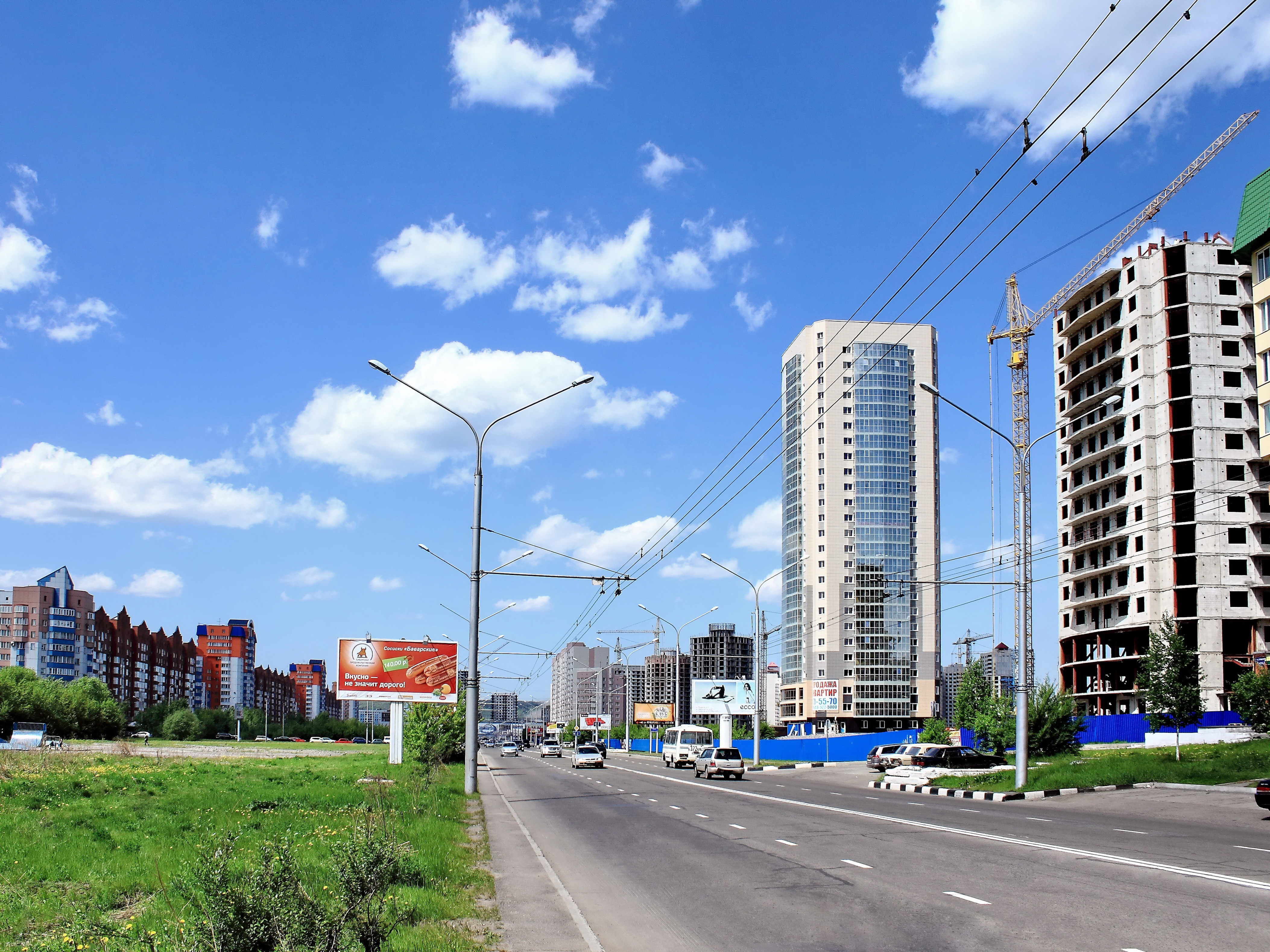 Ул. Тольятти